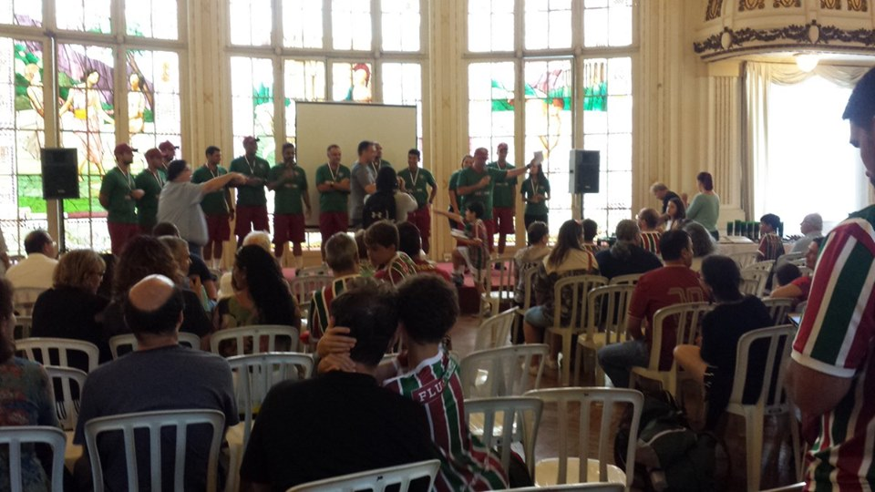 Cerimônia de encerramento da Flu Camp em 27 de janeiro de 2018 no Salão Nobre do Fluminense Football Club.